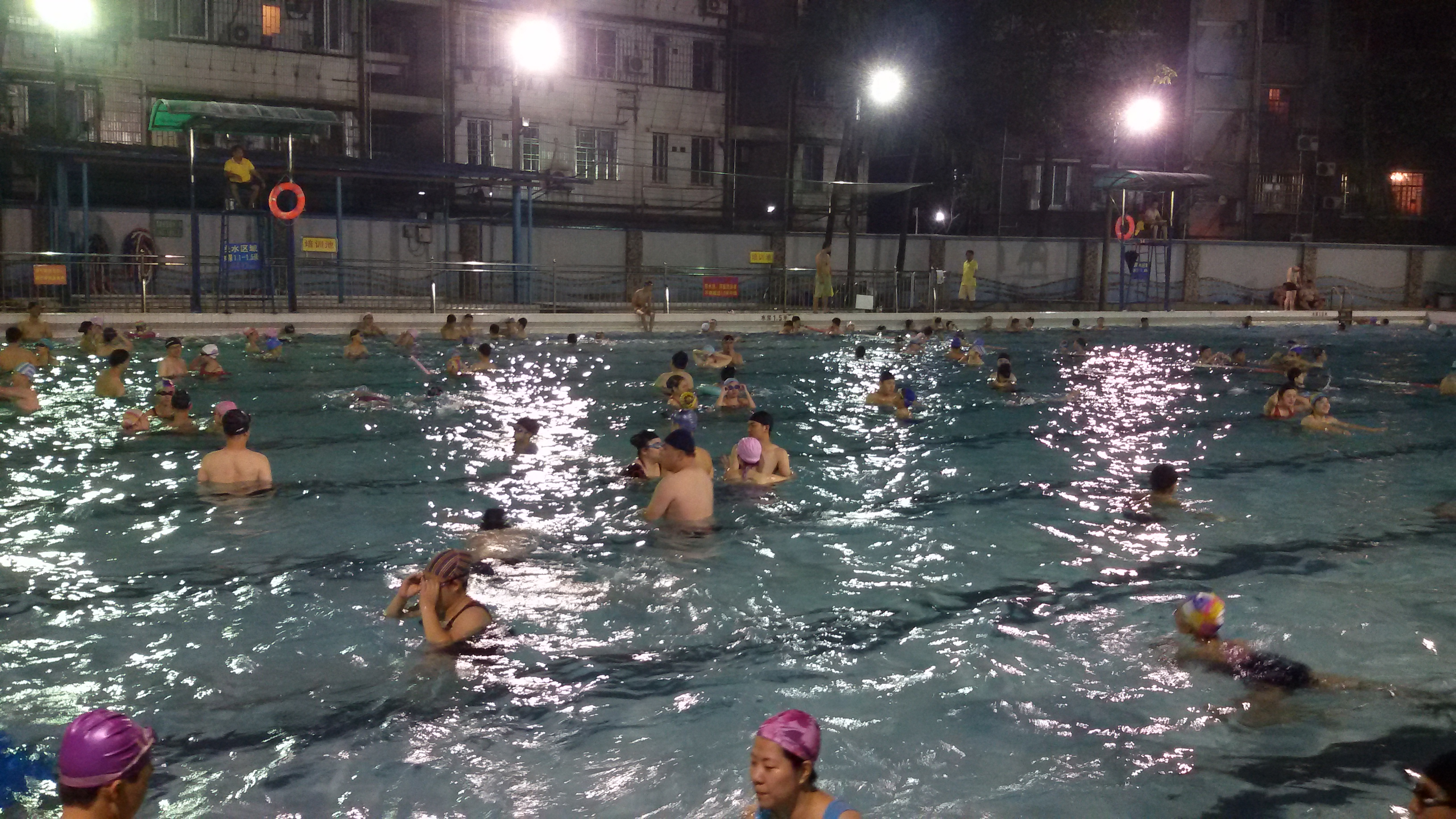 粵語: 廣海遊泳場嘅標準池